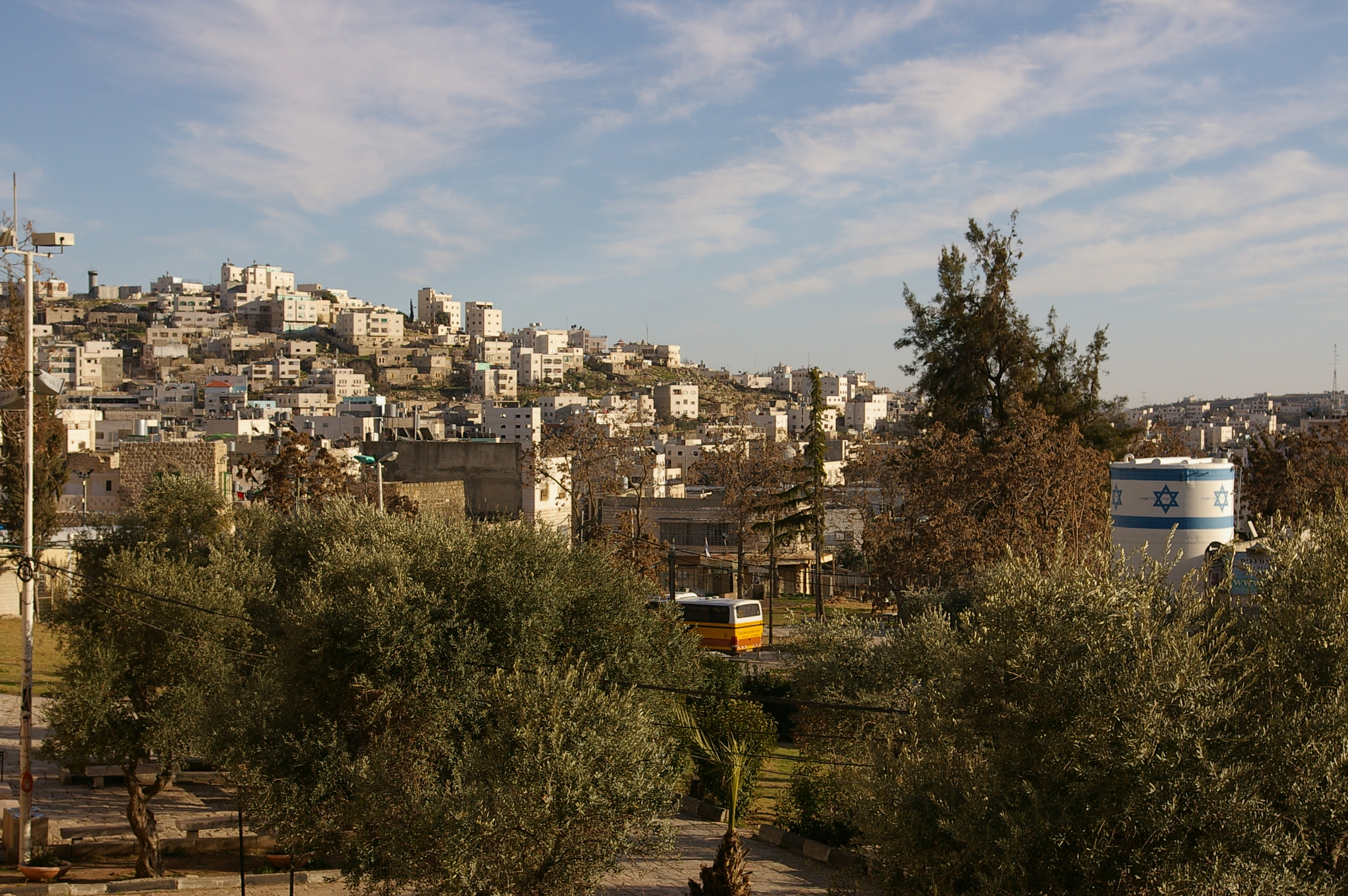 Hebron vue du tombeau des Patriarches (mars 2008)